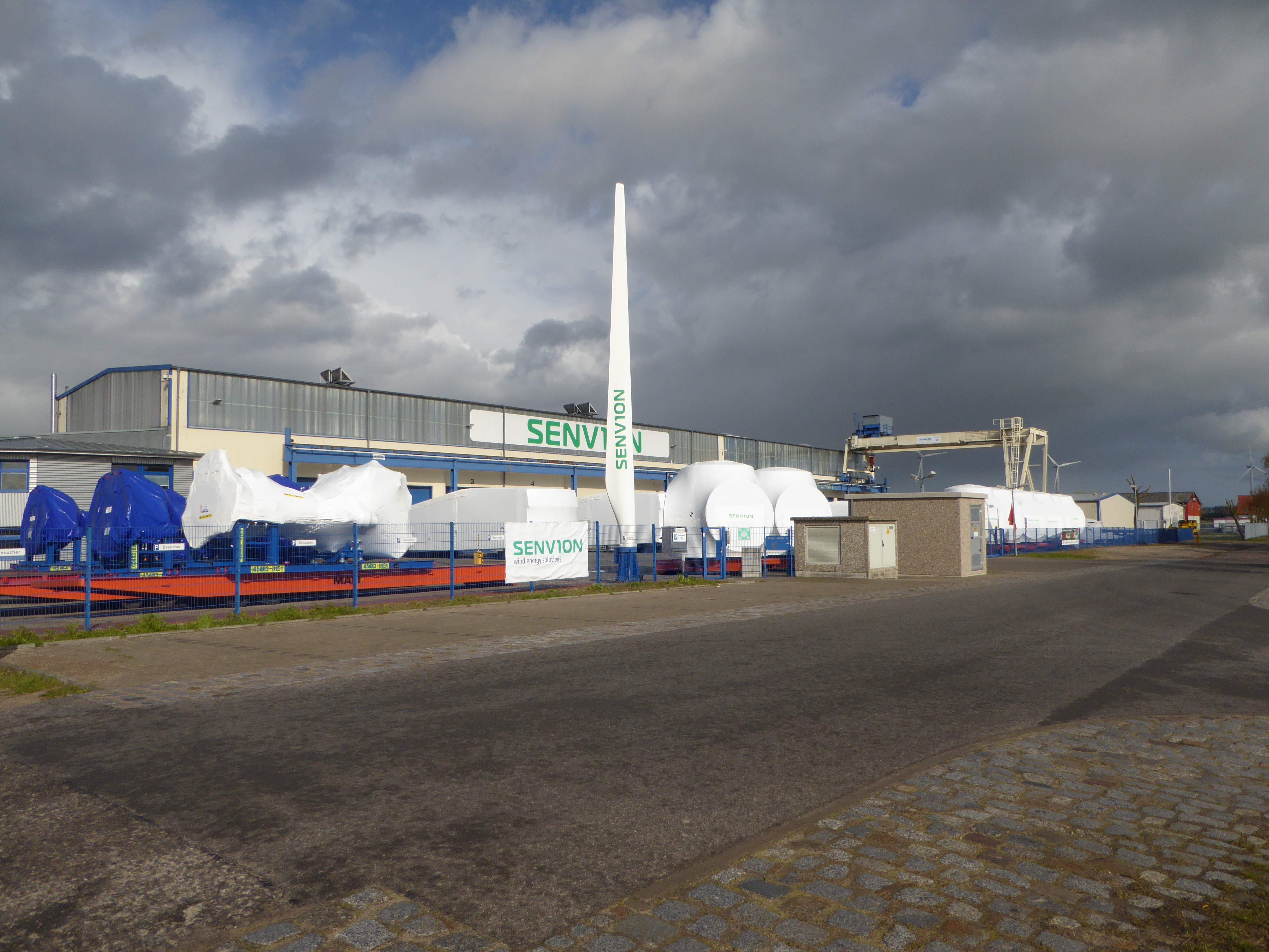 Dunkle Wolken über dem Senvion Produktions- und Servicestandort im brandenburgischen Trampe (2017)